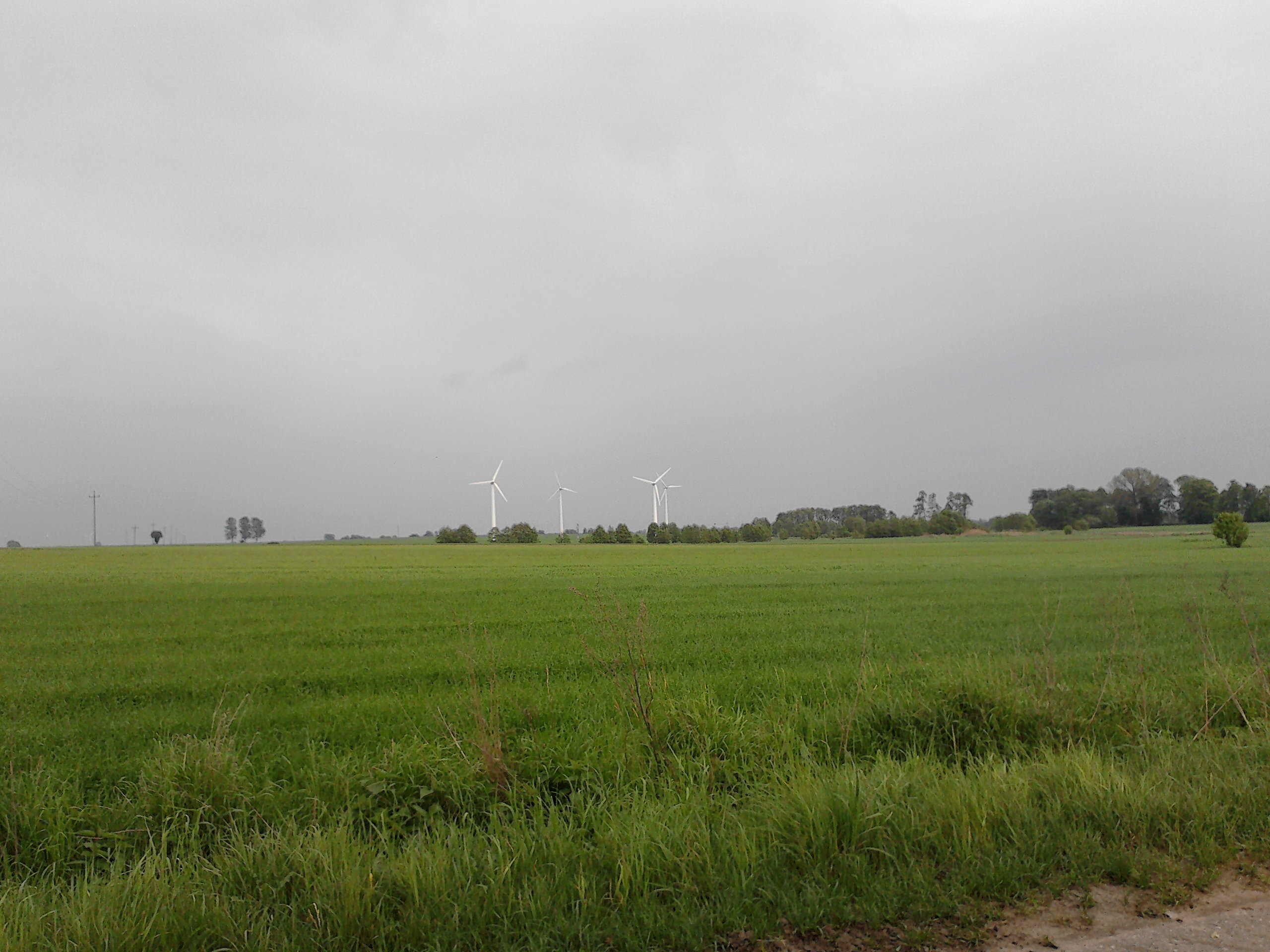 Wiatraki w Gościmowicach w gminie Moszczenica